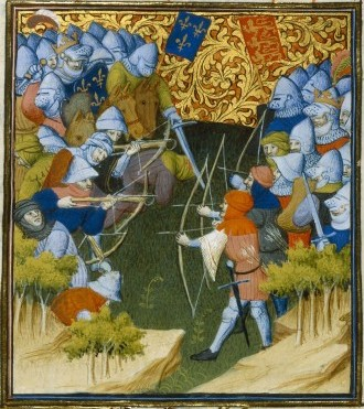 Battle of Crécy